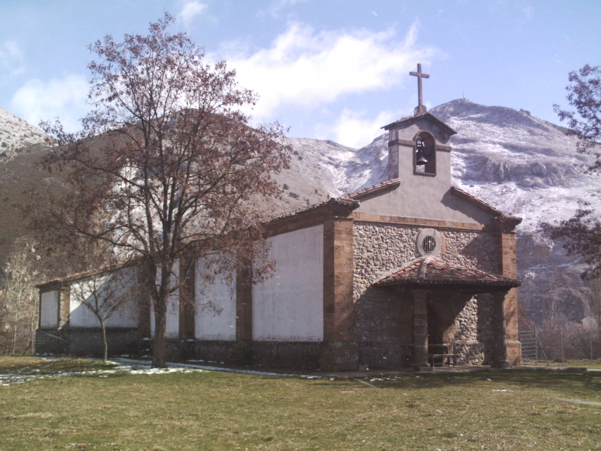 Ermita Nuestra Señora de Areños